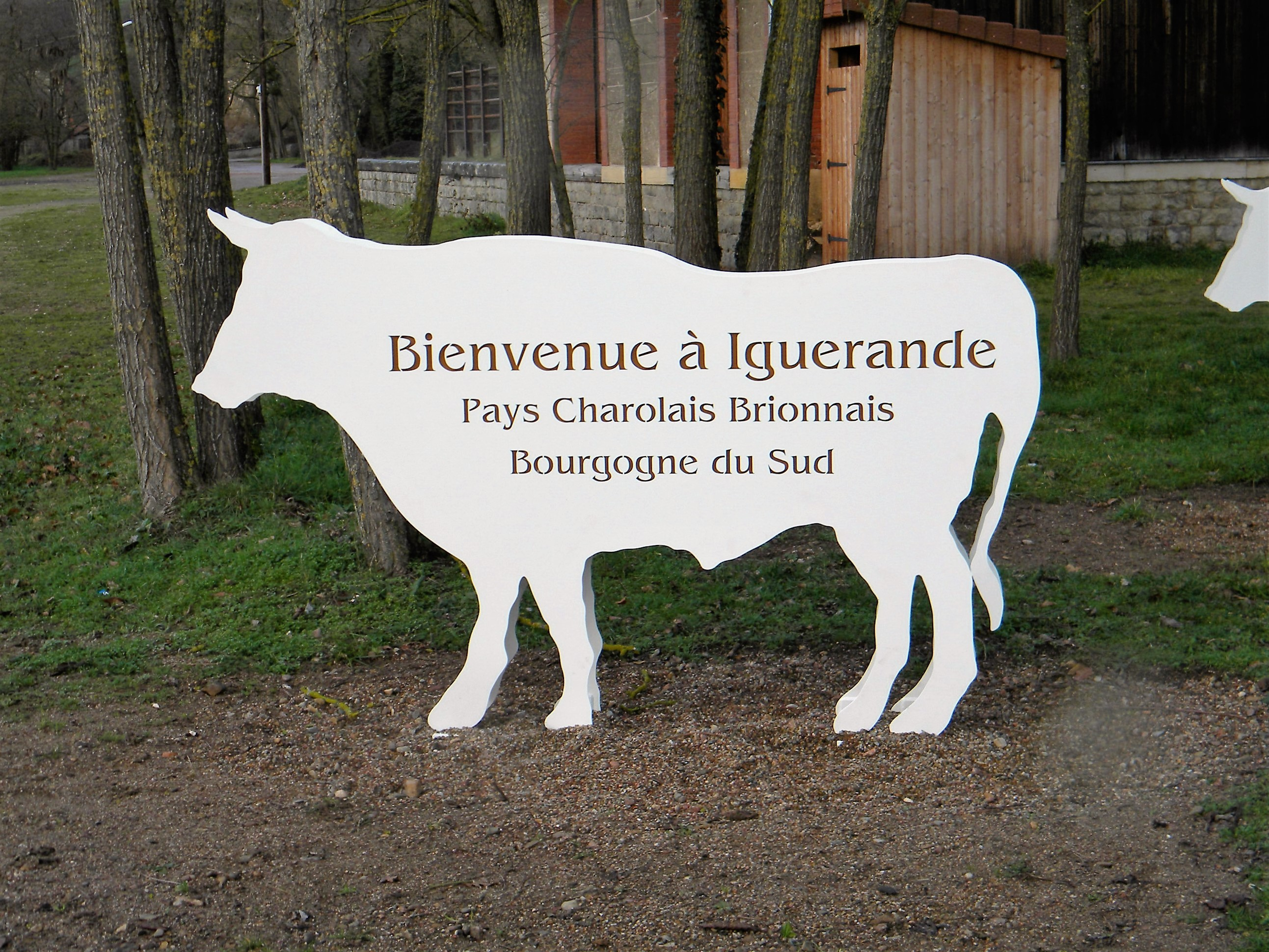 Panneau de bienvenue à Iguerande : le boeuf charolais